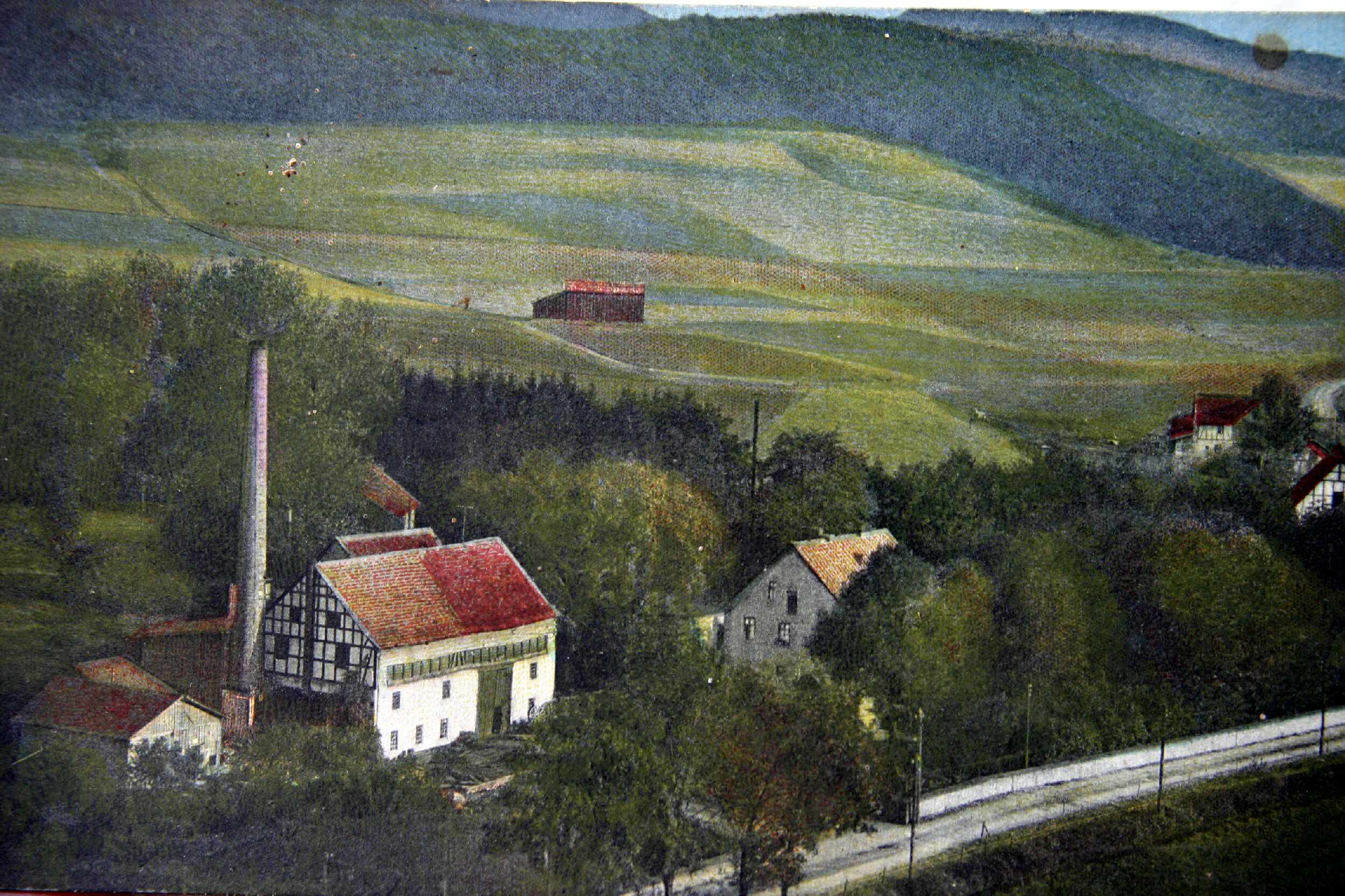 Lockschuppen des Gleislosen in Trockenbrück auf dem Gelände Hüttenhain